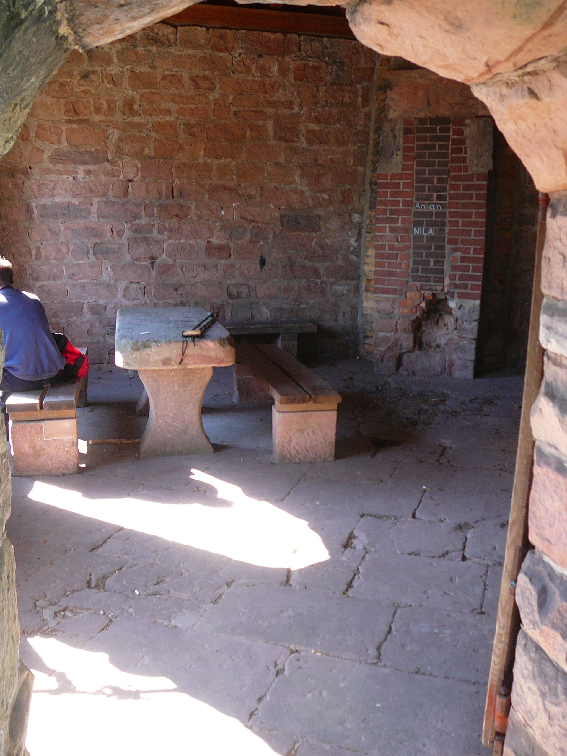 Aufenthaltsraum im Anbau des Luitpoldturms auf dem Weißenberg (Pfalz)